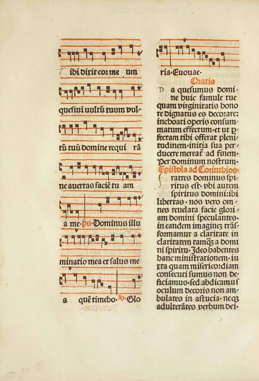 Hieronymus Porcius: [P]ontificalis ordinis liber incipit. In quo ea tantu[m] ordinata sunt. que ad officium Pontificis pertinent ... Blatt 75v Rom: Stephan Plannck, 1485 Herzog August Bibliothek Wolfenbüttel Signatur: inkunabeln/408-theol-2f Permalink: Verteilte digitale Inkunabelbibliothek